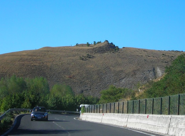 Castelliere di Colfiorito, Foligno, Perugia, Umbria, Italy